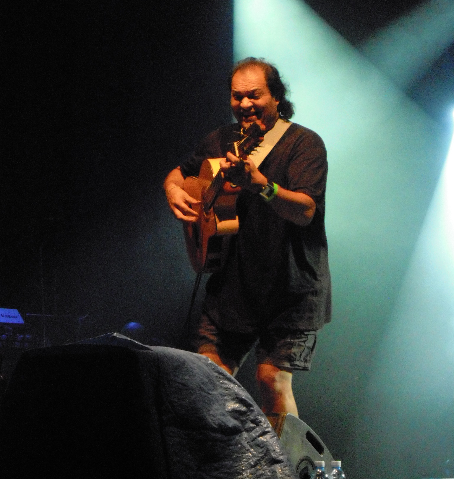 Diego Cortés tocando a guitarra nun concerto de Albert Pla en Bueu